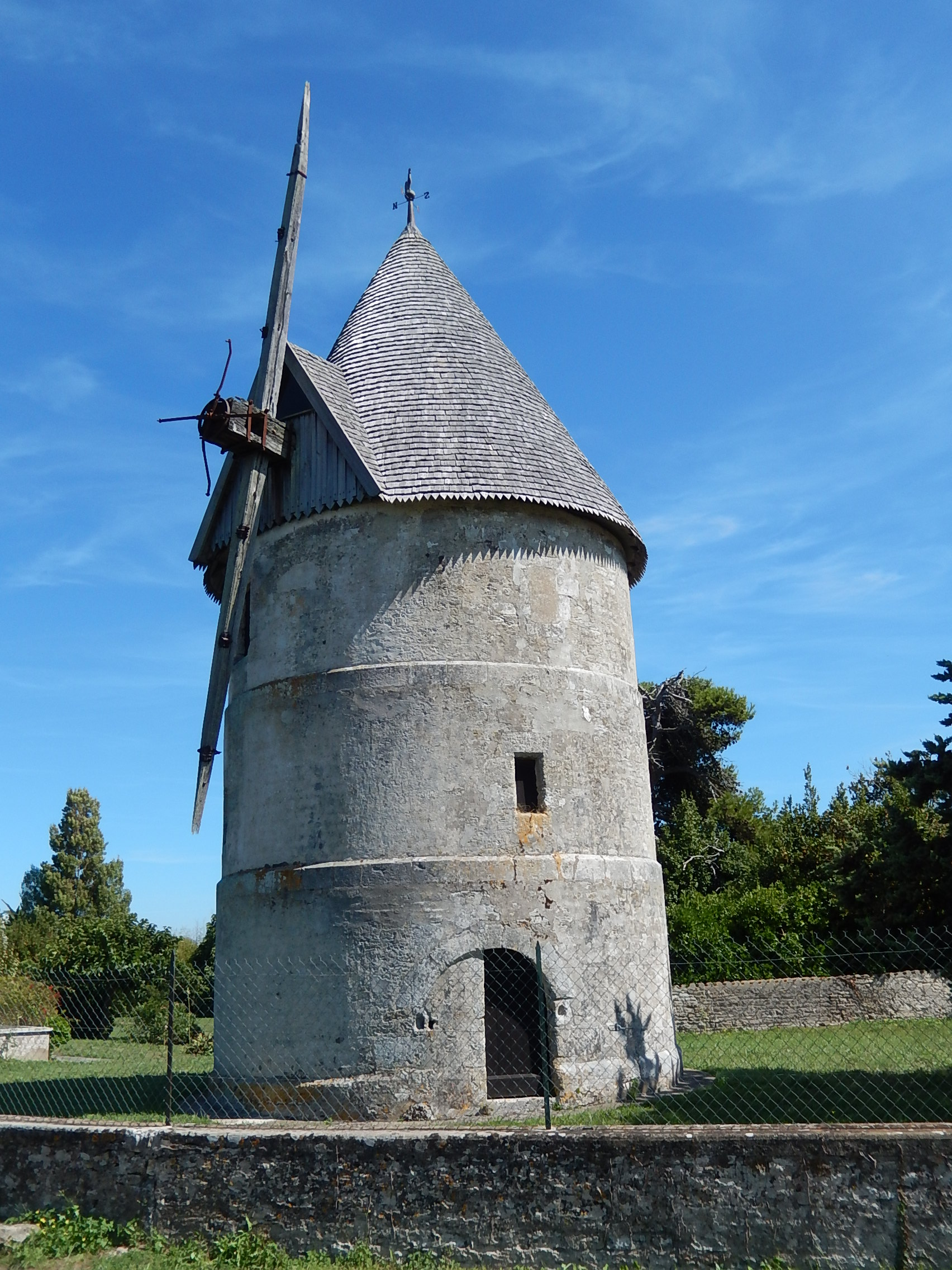 Le moulin de la Brée, sur l'île d'Oléron.